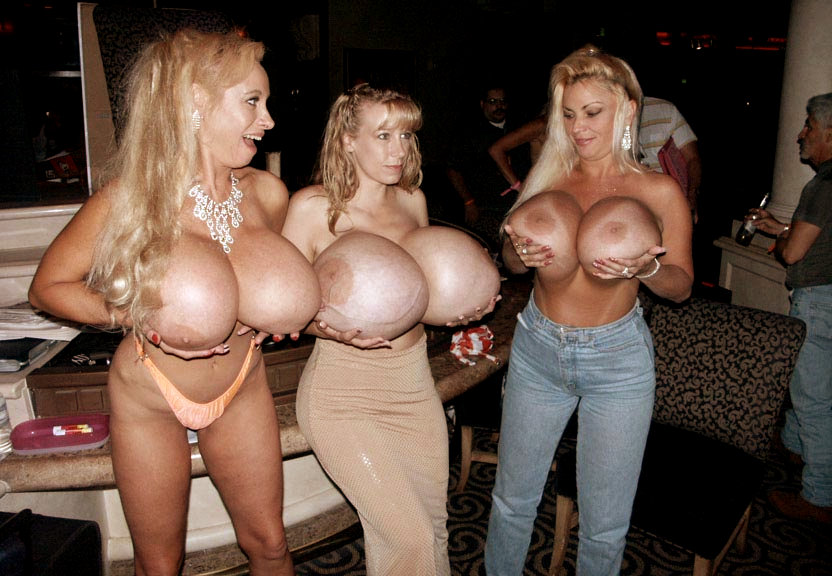 hier wurde Brustvergrößerung ernst genommen, zu bewundern auf einer Erotikmesse